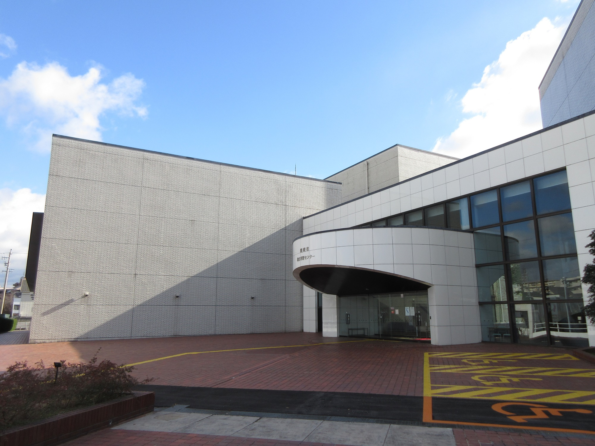 岡崎市総合学習センター（岡崎市上地）